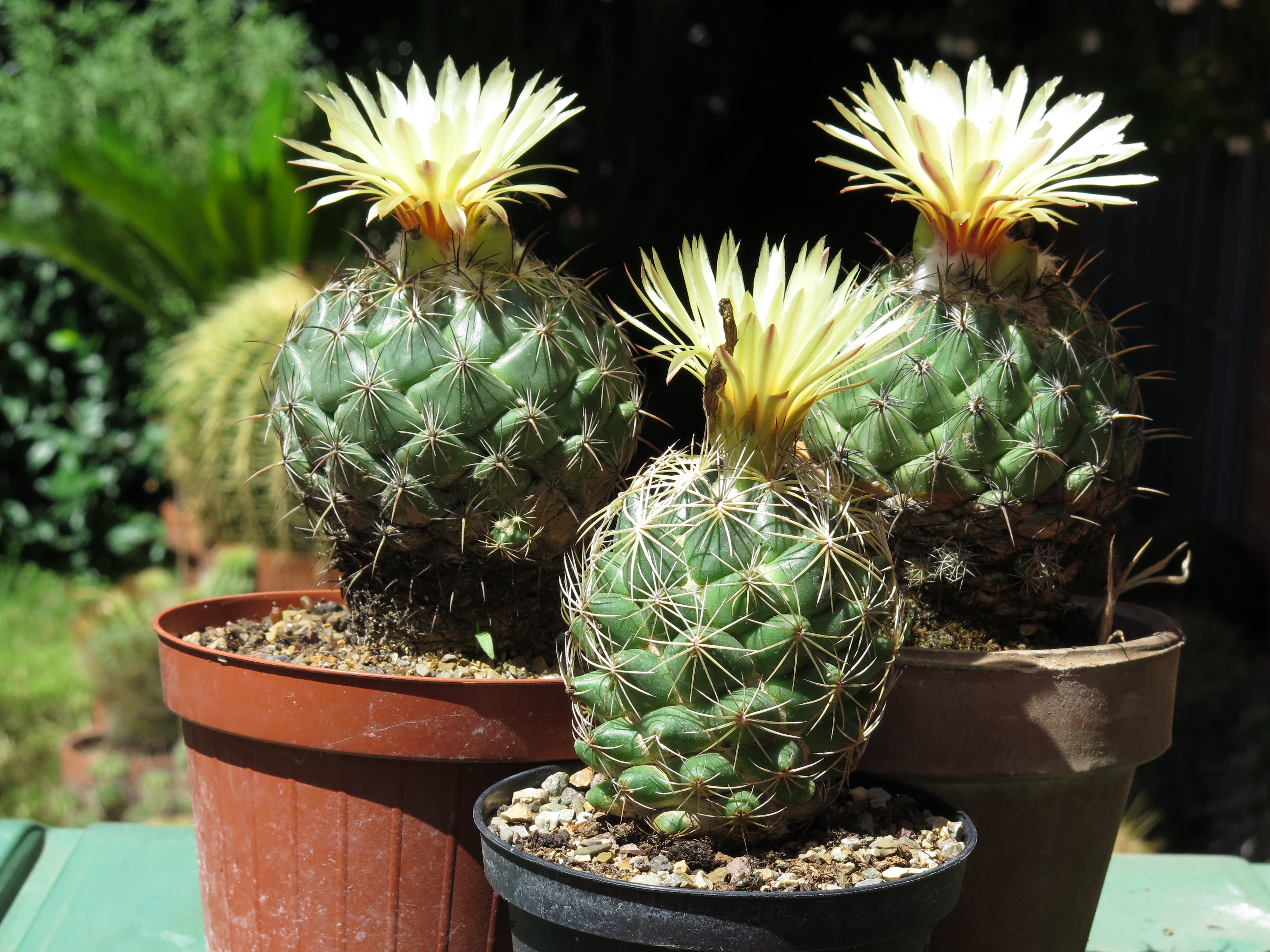 Guppo di coryphantha delicata in fiore